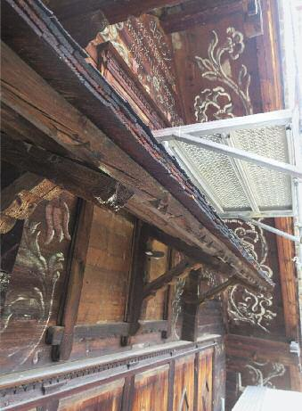 in den 1950er Jahren unsachgemäss ergänzte Fassadenmalerei am Museum Ackerhus Ebnat-Kappel